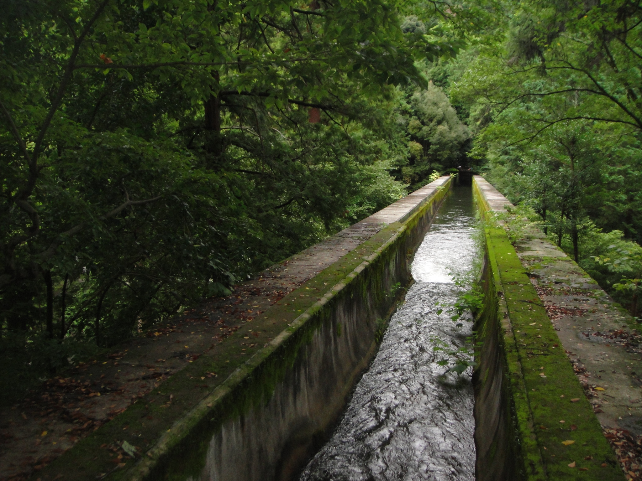 南禅寺水路閣上